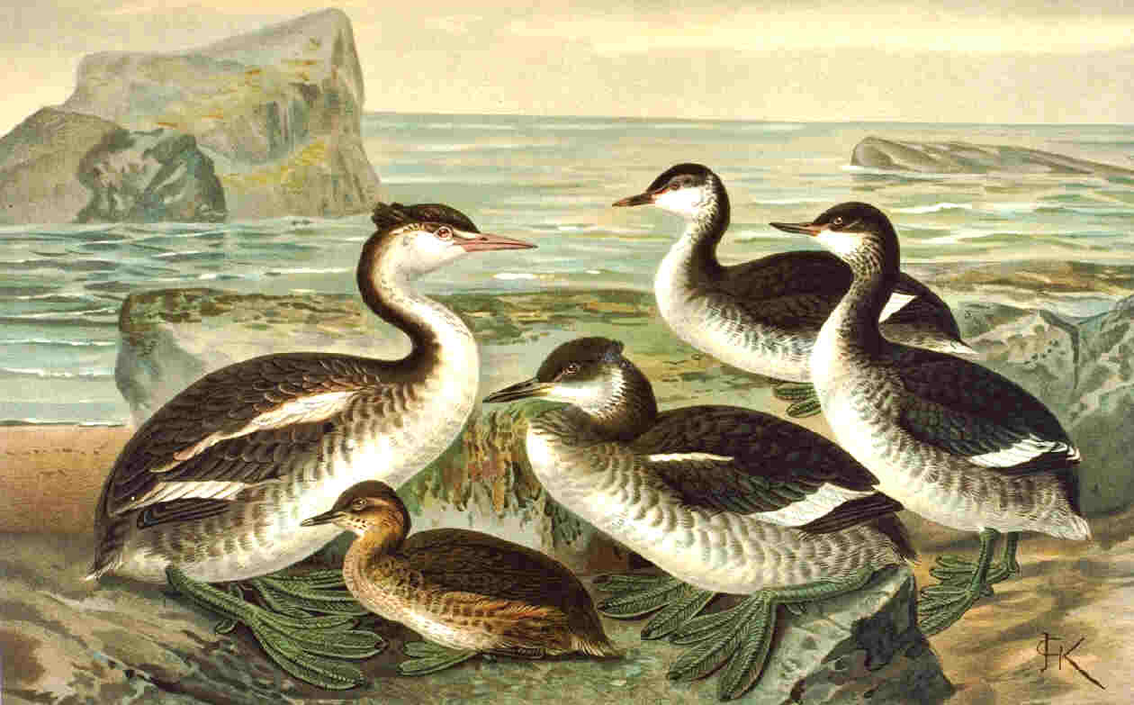 Podicipedidae. Tachybaptus ruficollis, Podiceps grisegena, Podiceps cristatus, Podiceps nigricollis, Podiceps auritus